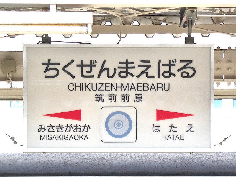 JR鹿児島本線筑前前原駅 前原市内の遺跡で多数出土した、銅鏡を描いた駅名標 撮影者/著者/著作権保有者 : MK Products (本人がアップロード) 撮影日 : 2006/11/04 筑前前原駅用にアップロードした画像です。良い画像があれば別の画像に変えてください。